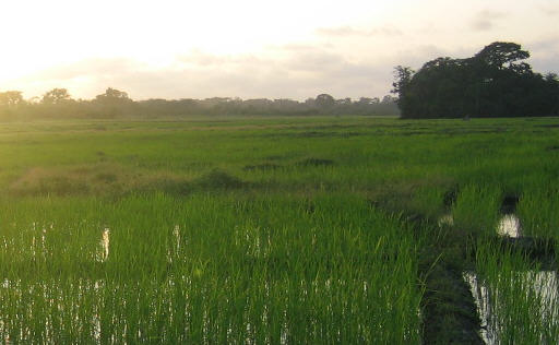 cultivo de arroz en Paraguay